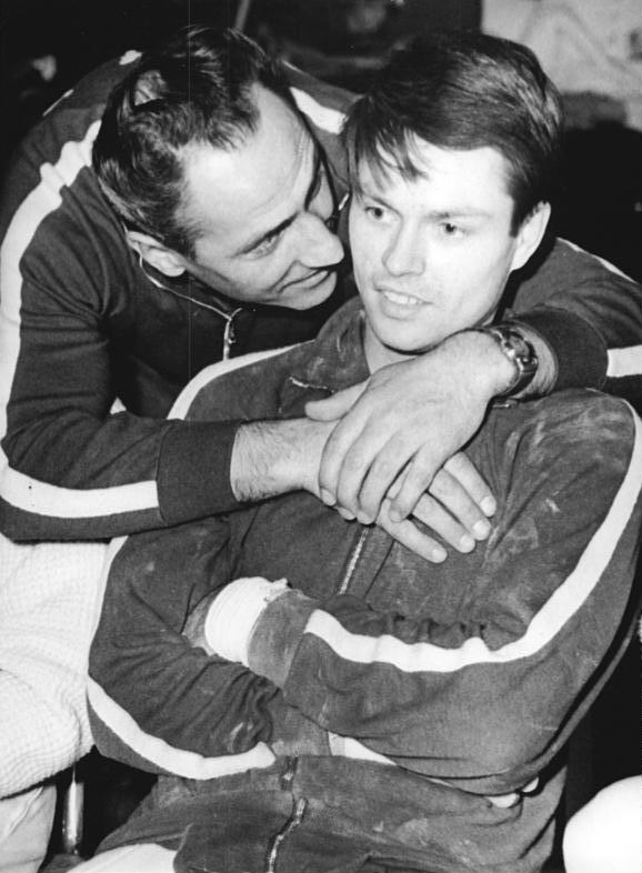 Jochen Nonnast, Mathias Brehme Zentralbild Studré 6.12.1965 Neustrelitz: Deutsche Turnmeisterschaften - Brehme fünffacher Meister. Glücklich und zufrieden sind Trainer Jochen Nonnast (links) und sein Schützling Mathias Brehme (SC DHfK Leipzig). Nach der hervorragenden Reck-Kür des Leipzigers am 5.12.1965 in Neustrelitz zogen alle vier Kampfrichter die Höchstnote "10". Mathias Brehme erkämpfte sich die Titel im Zwölfkampf, am Seitpferd, an den Ringen, am Barren und am Reck.